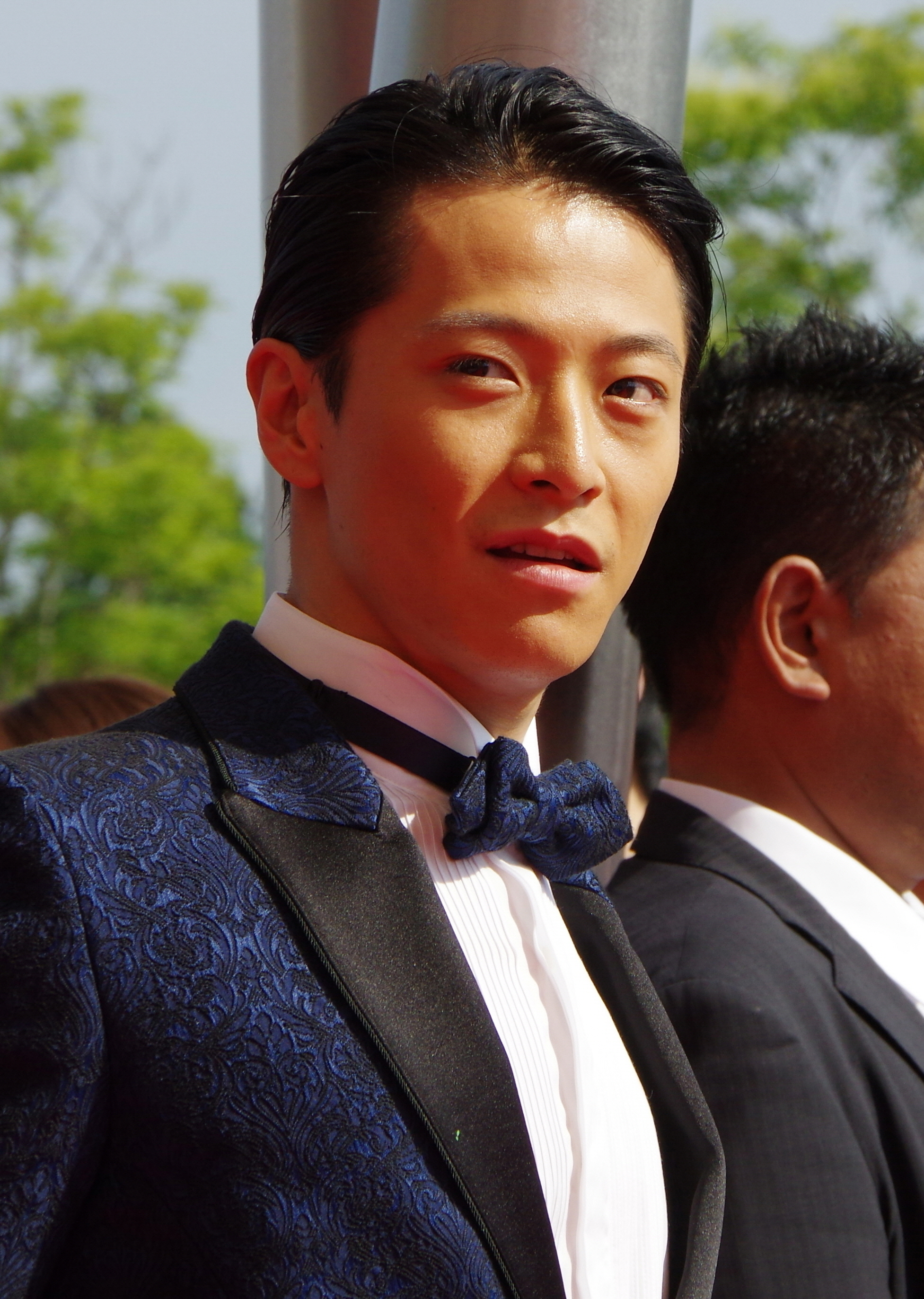 MTV VMAJ 2014_005_w-inds.